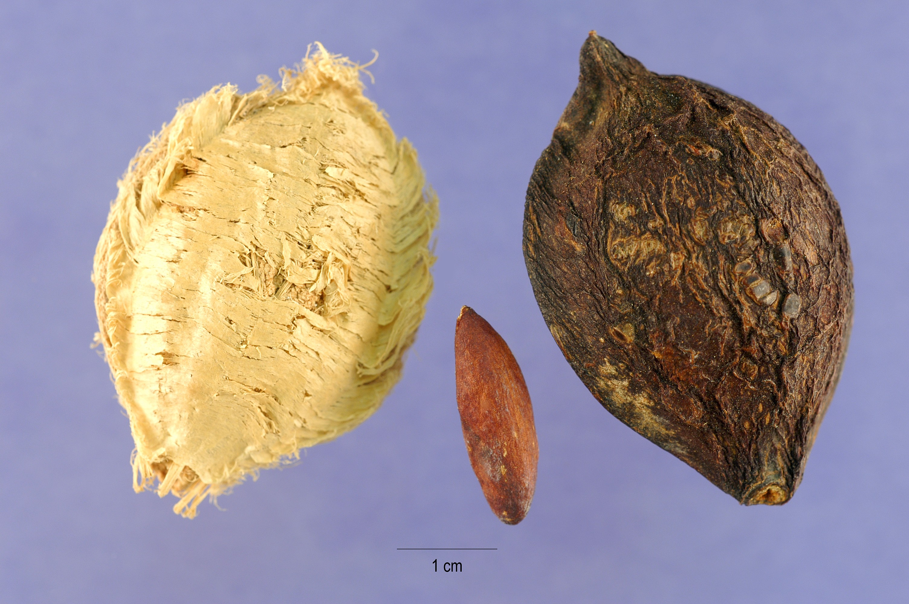 Terminalia catappa L. (tropical almond)